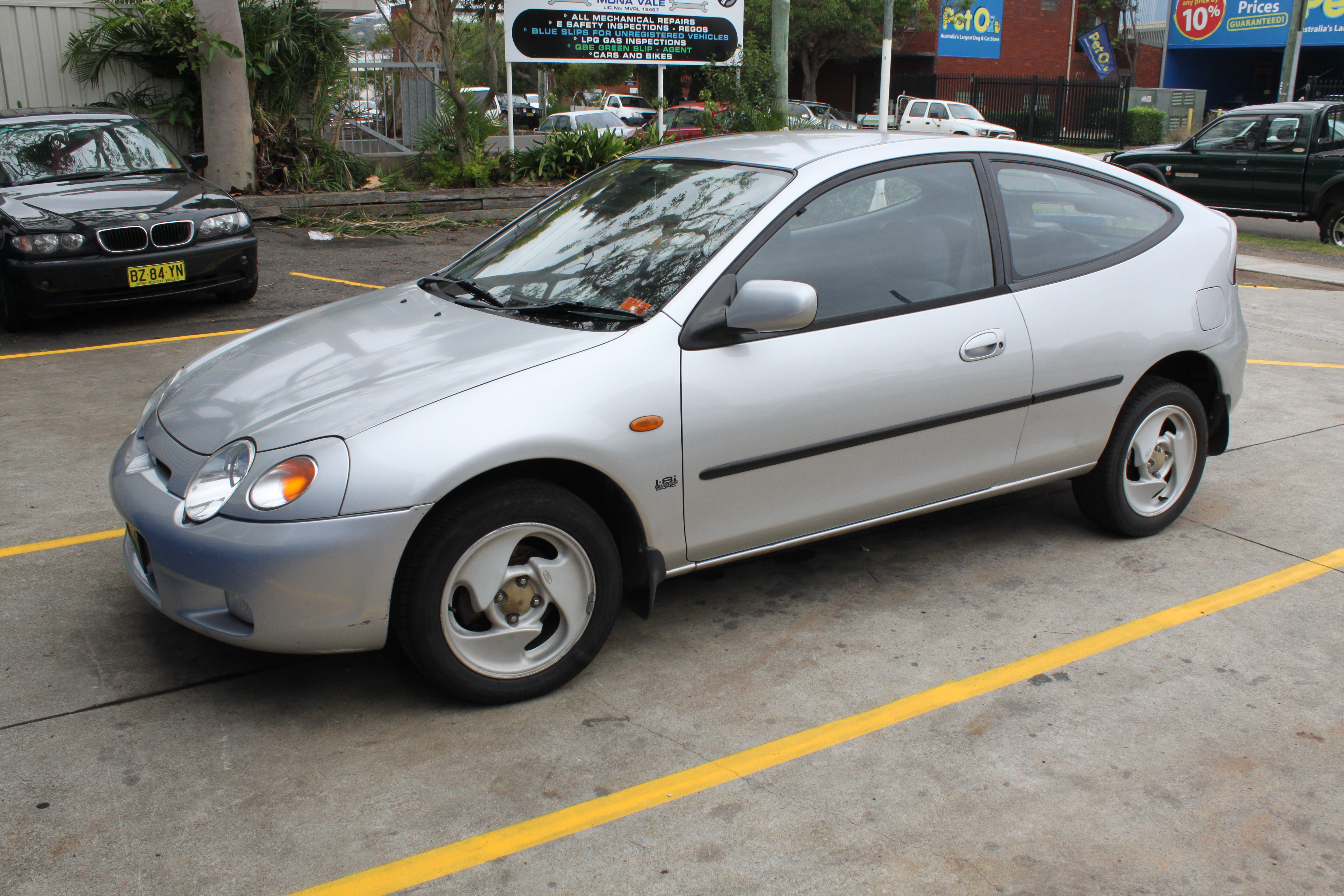 Ford Laser KJ Lynx